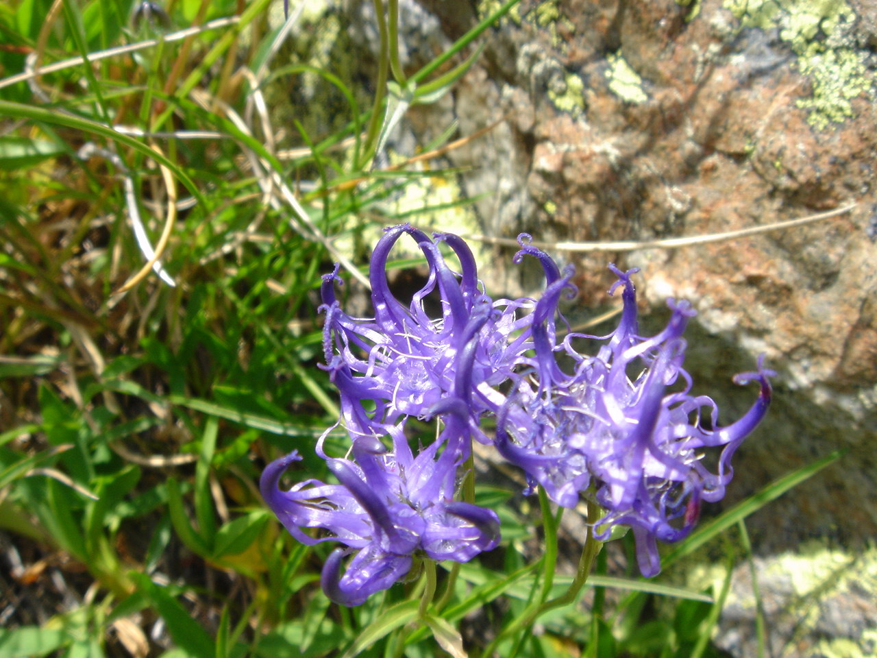 Phyteuma globulariifolium subsp. pedemontanum